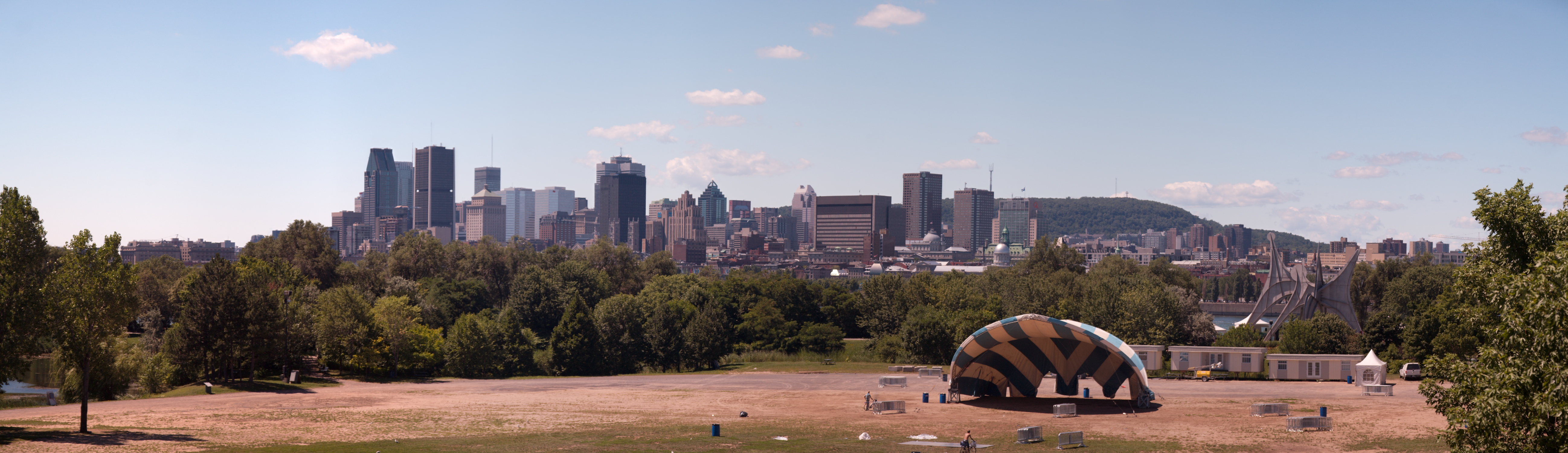 Parc Jean-Drapeau, Montreal, Quebec